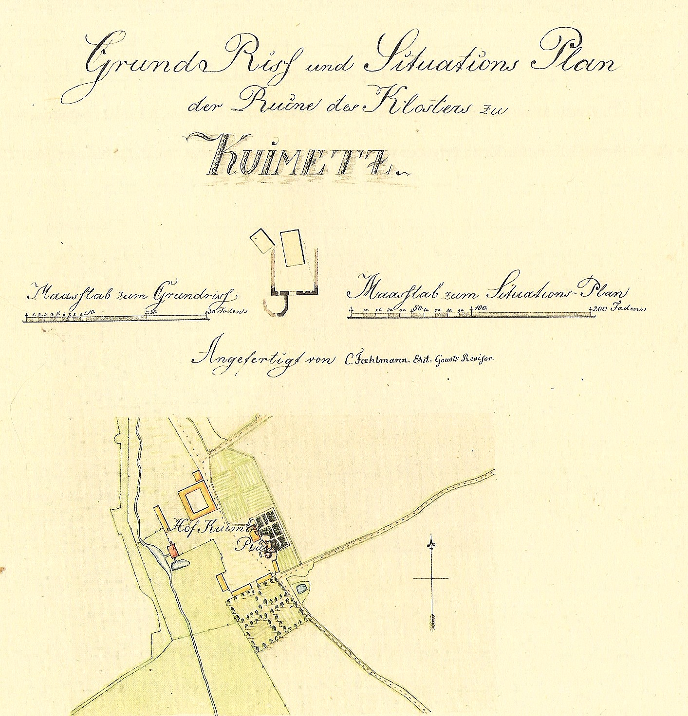 Kuimetsa kloostri asendiplaan. Paulucci album